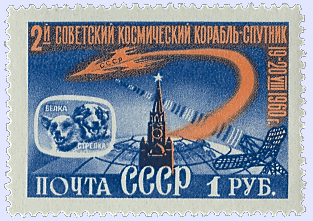 Почтовая марка СССР 1 рубль, посвященная полету Белки и Стрелки.